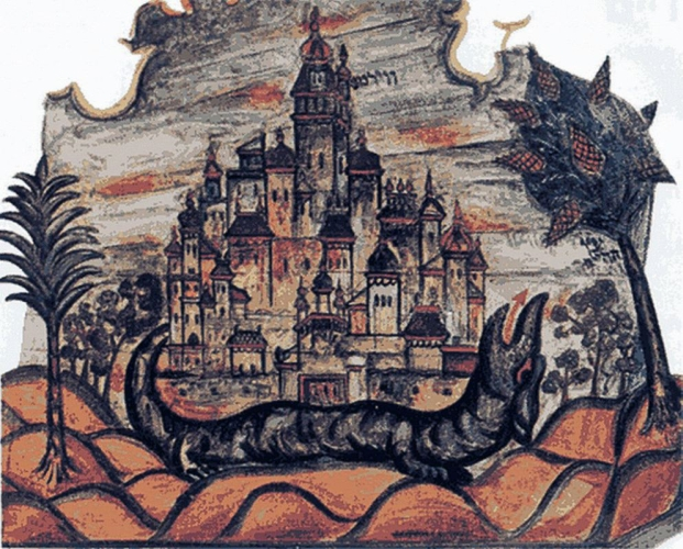 Роспіс Магілёўскай халоднай сінагогі. Тэма роспісу - цмок, які тэрарызаваў жыхароў нямецкага горада Вормс